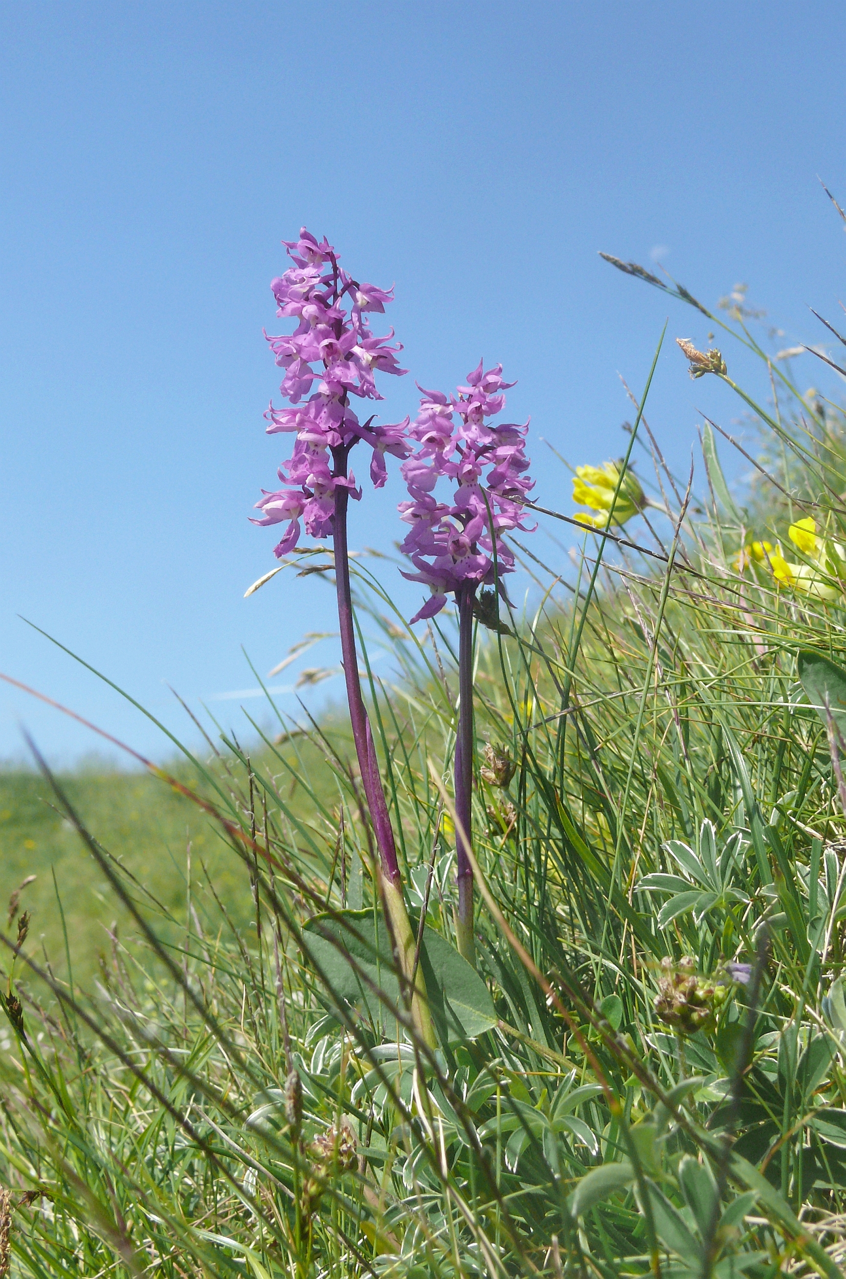 Orchis mascula subsp. speciosa Allgäuer Alpen, Deutschland